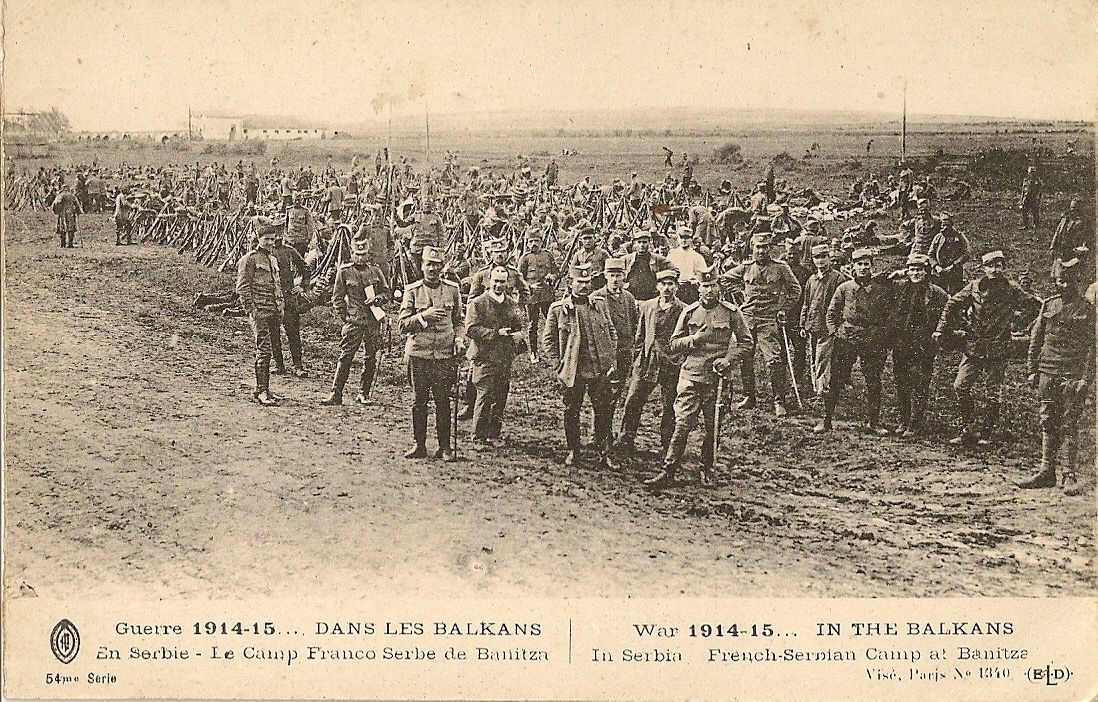 Френско-сръбски лагер при Баница през Първата световна война.